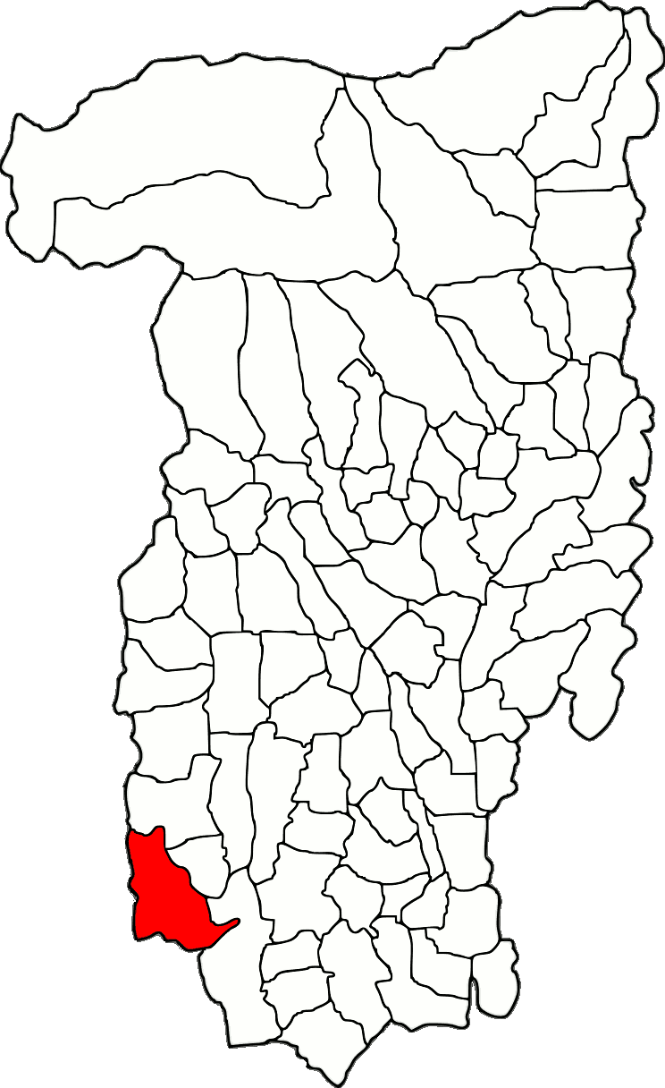 Lage der Gemeinde Ghioroiu im Kreis Vâlcea (RO).